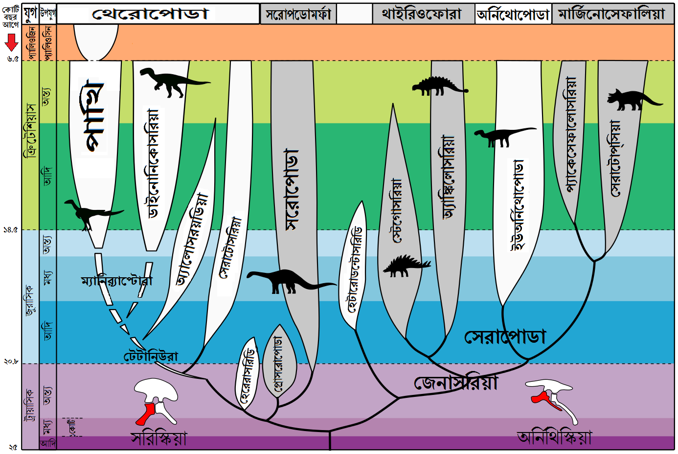 ডাইনোসরদের বিবর্তনের একটি সরলীকৃত রেখাচিত্র; প্রধান প্রধান শাখাগুলিকেই কেবলমাত্র চিহ্নিত করা হয়েছে।